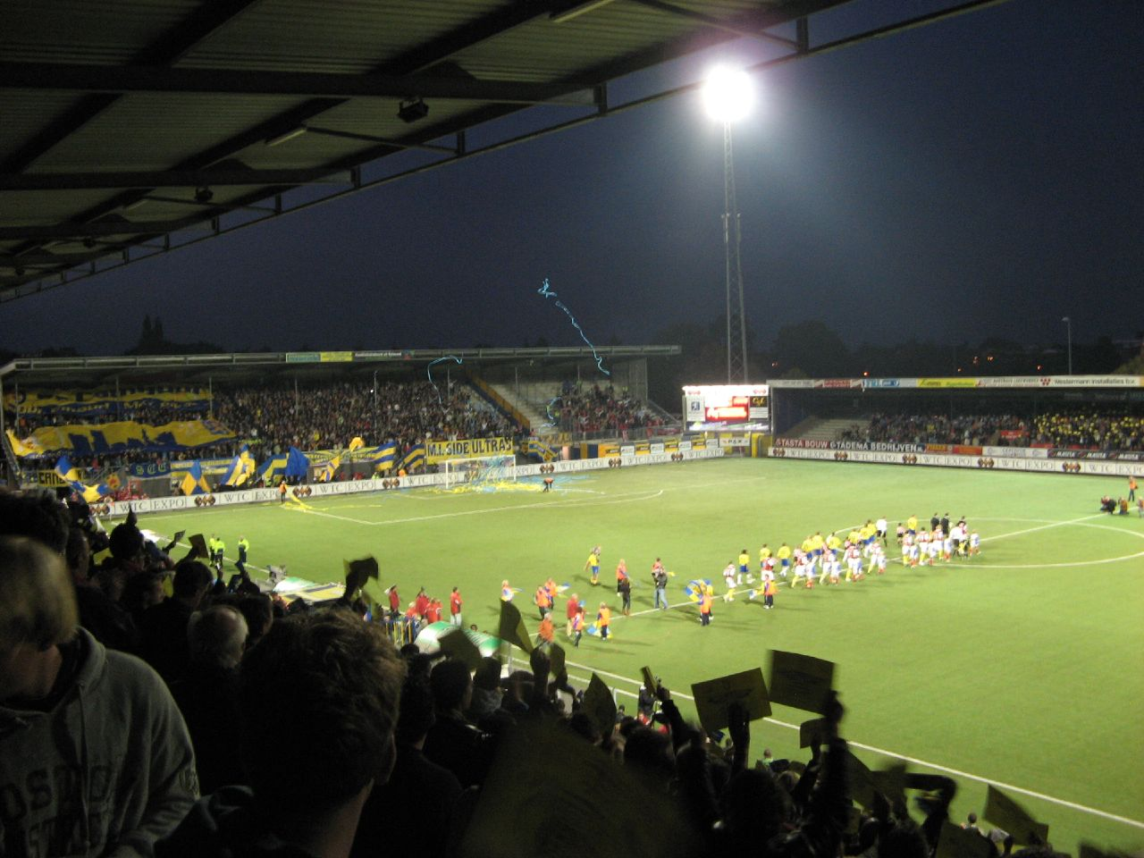 Het Cambuurstadion, thuisbasis van Cambuur Leeuwarden